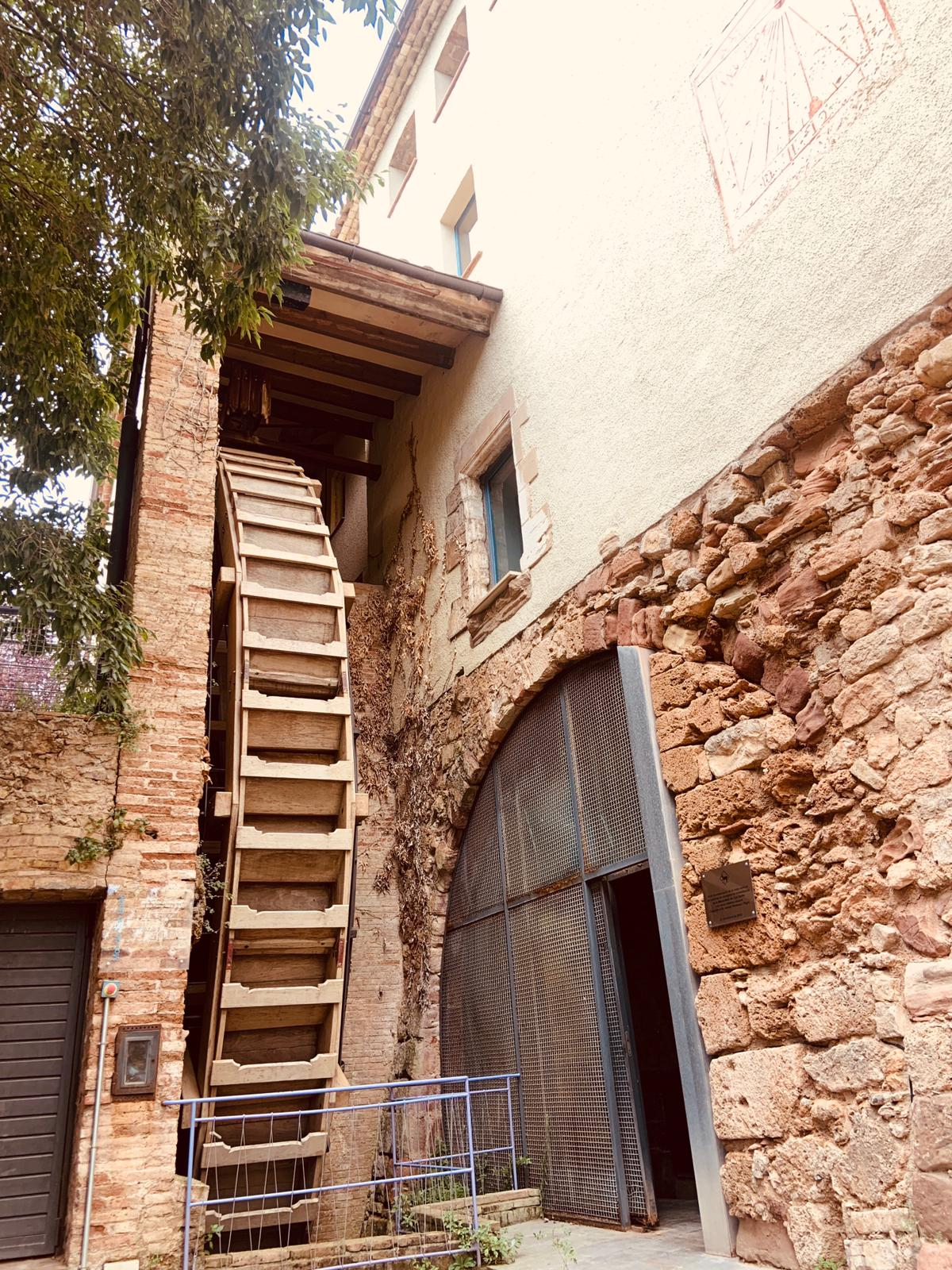 El origen del molino se remonta al final del siglo XV, dotación corroborada por las restas de cerámica encontradas durante la excavación de diferentes arqueólogos, utilizadas como ruinas en la construcción inicial. Se trata de un molino de harina de rodillo horizontal, alimentado por agua de la riera a partir de una balsa situada al lado del molino el cual esta escavado dentro del terreno natural, haciendo buen uso así del desnivel.